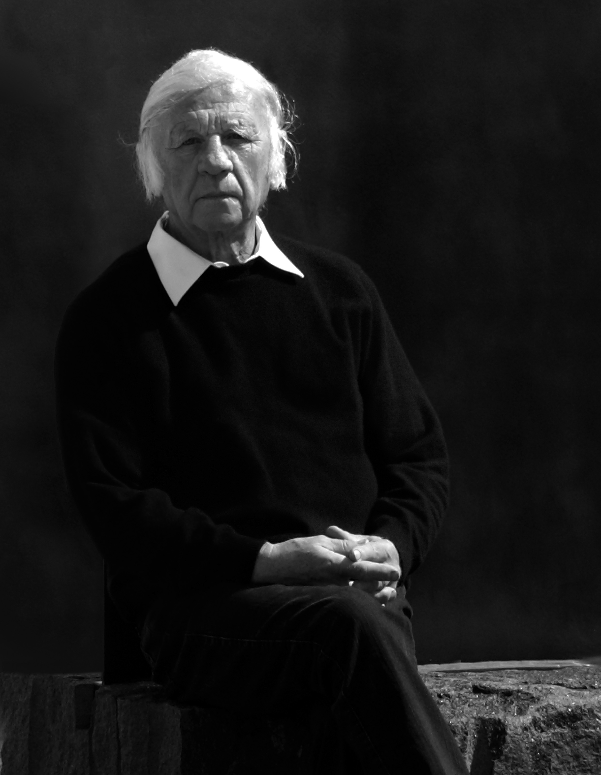 Heinz Mack kurz vor seinem 80. Geburtstag, 2011. Foto: R. Weiss / Archiv Mack